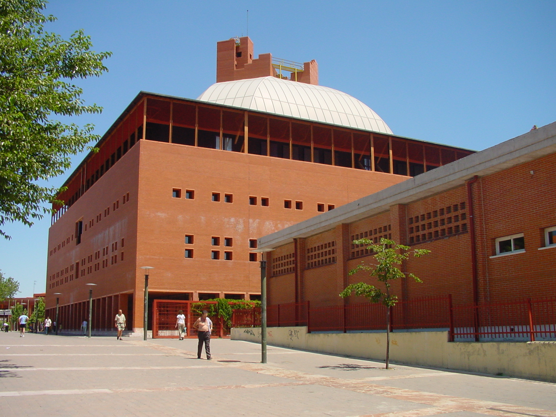 Auditorio Padre Soler, en el campus de la Universidad Carlos III en Leganés.